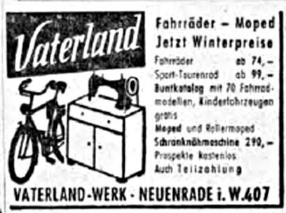 Werbeanzeige der Firma Vaterland vom Oktober 1955 in der Ostpreußenzeitung Comments: Concering German copyright law, this picture is in the public domain, since, even though it has some originality, it does not clearly surpass average logo design, which is however required for applied art to be copyrighted (to make sure design patent law as lex specialis is not being circumvented this way).